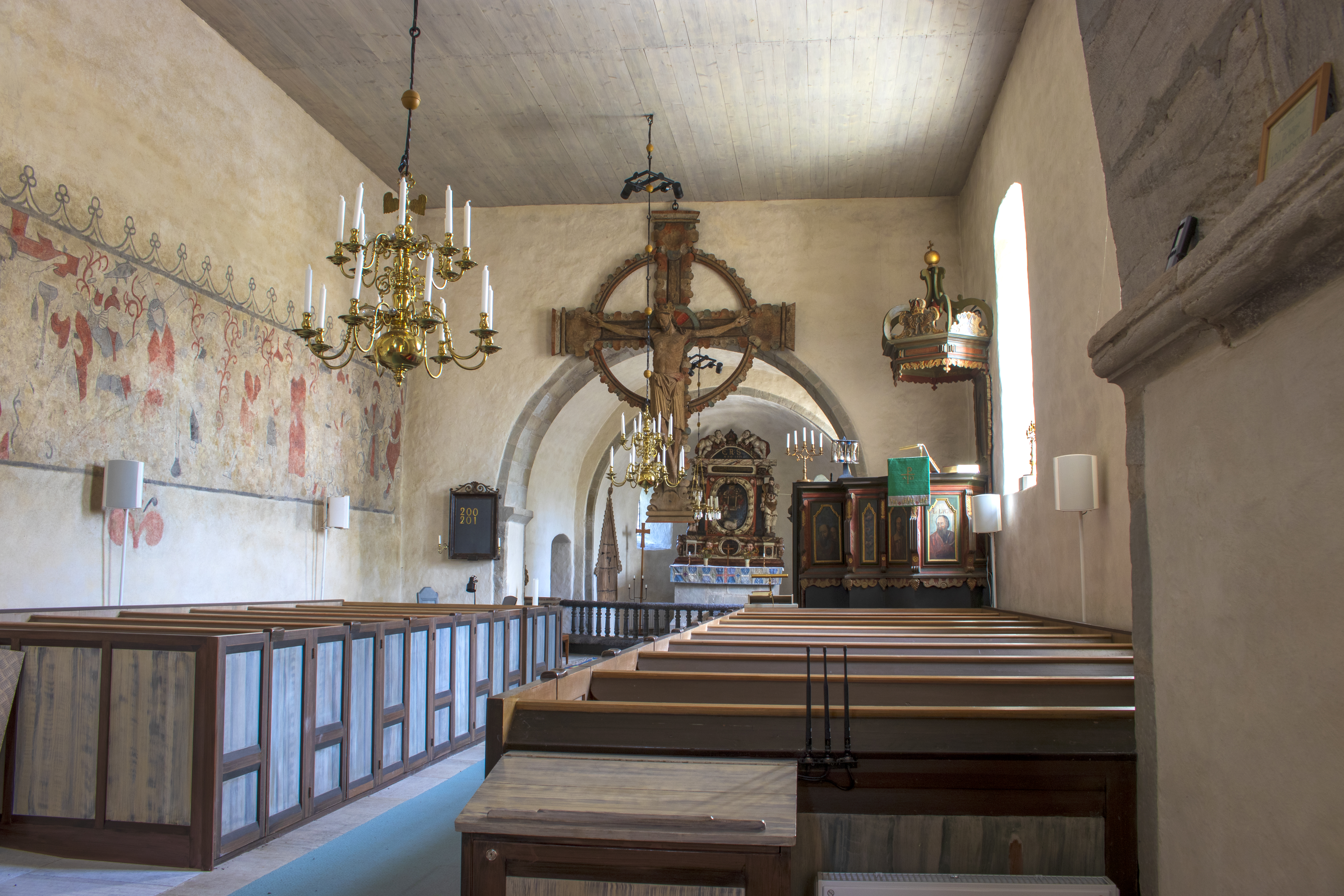 Interior da igrexa de Alva, na illa sueca de Gotland.